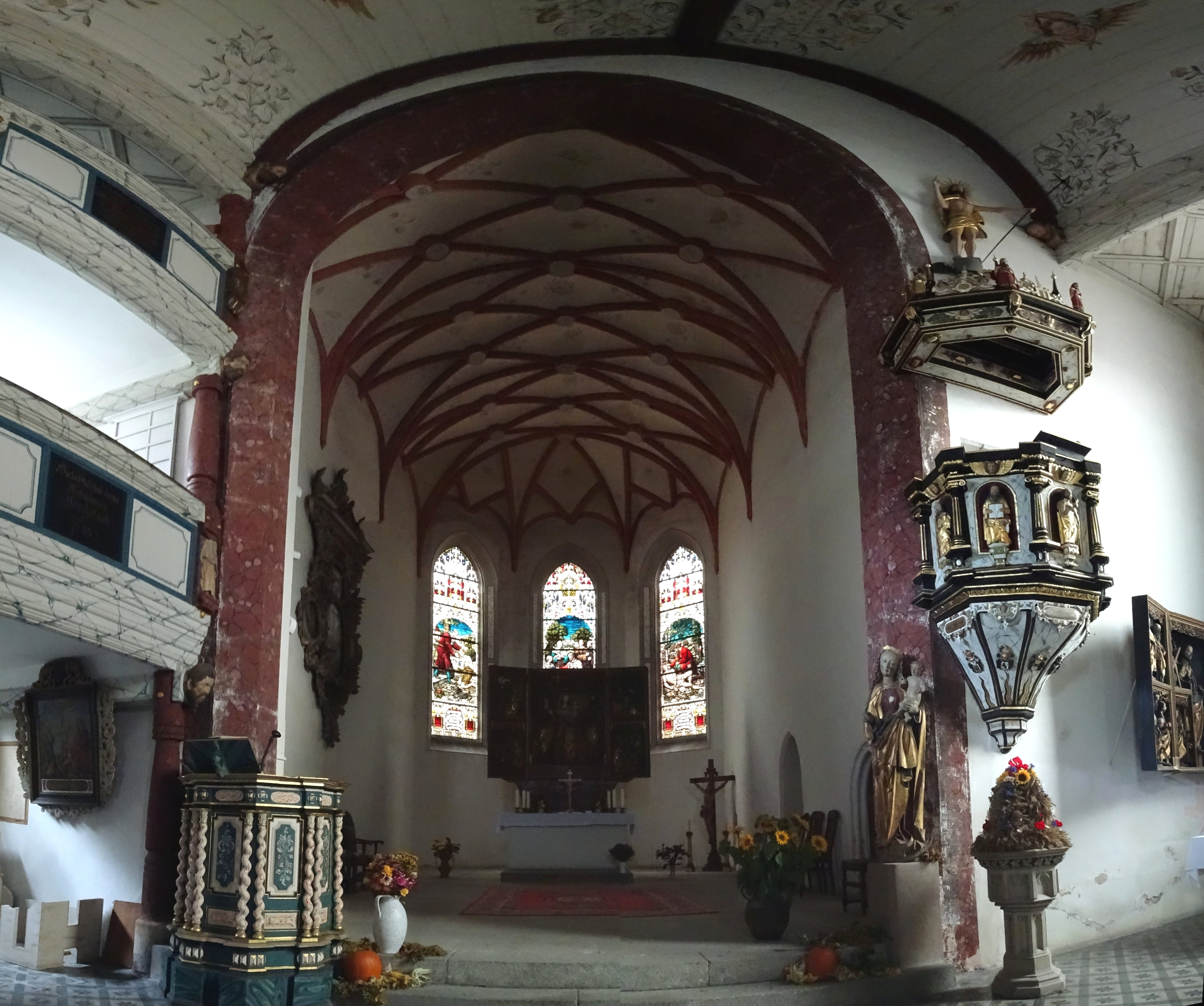 eine der am reichsten ausgestatteten Kirchen des oberen Werratals